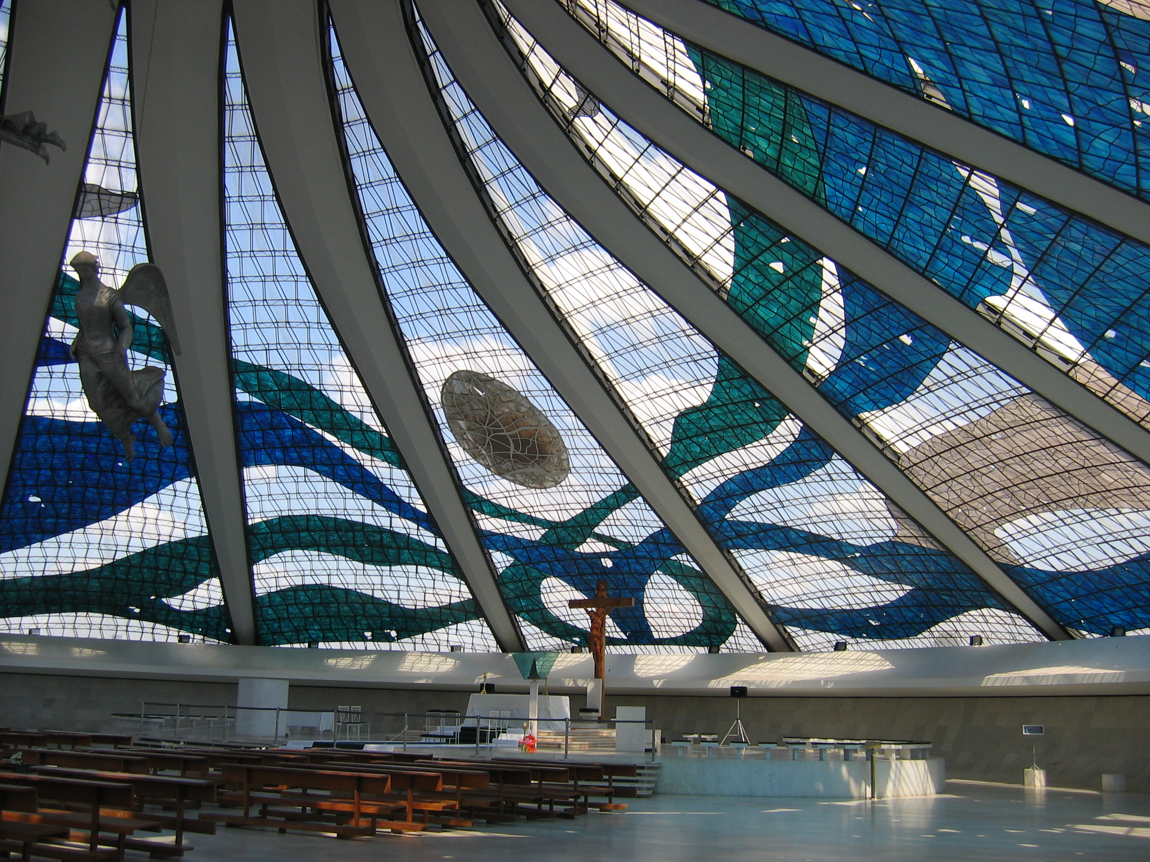 Interior da Catedral de Brasília